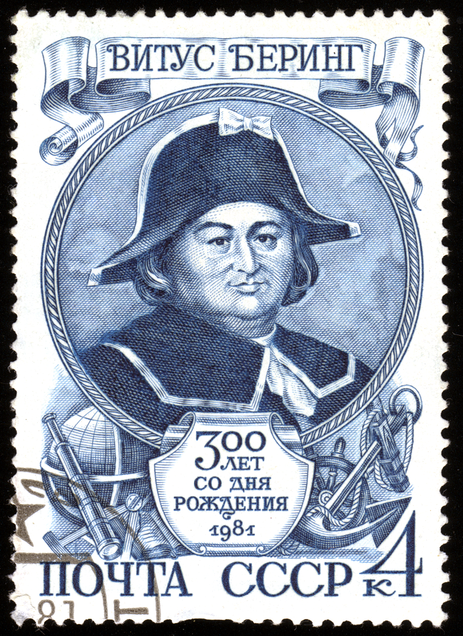 Почтовая марка выпущенная Почтой СССР в 1981 году в честь 300-летия со дня рождения Витуса Беринга.